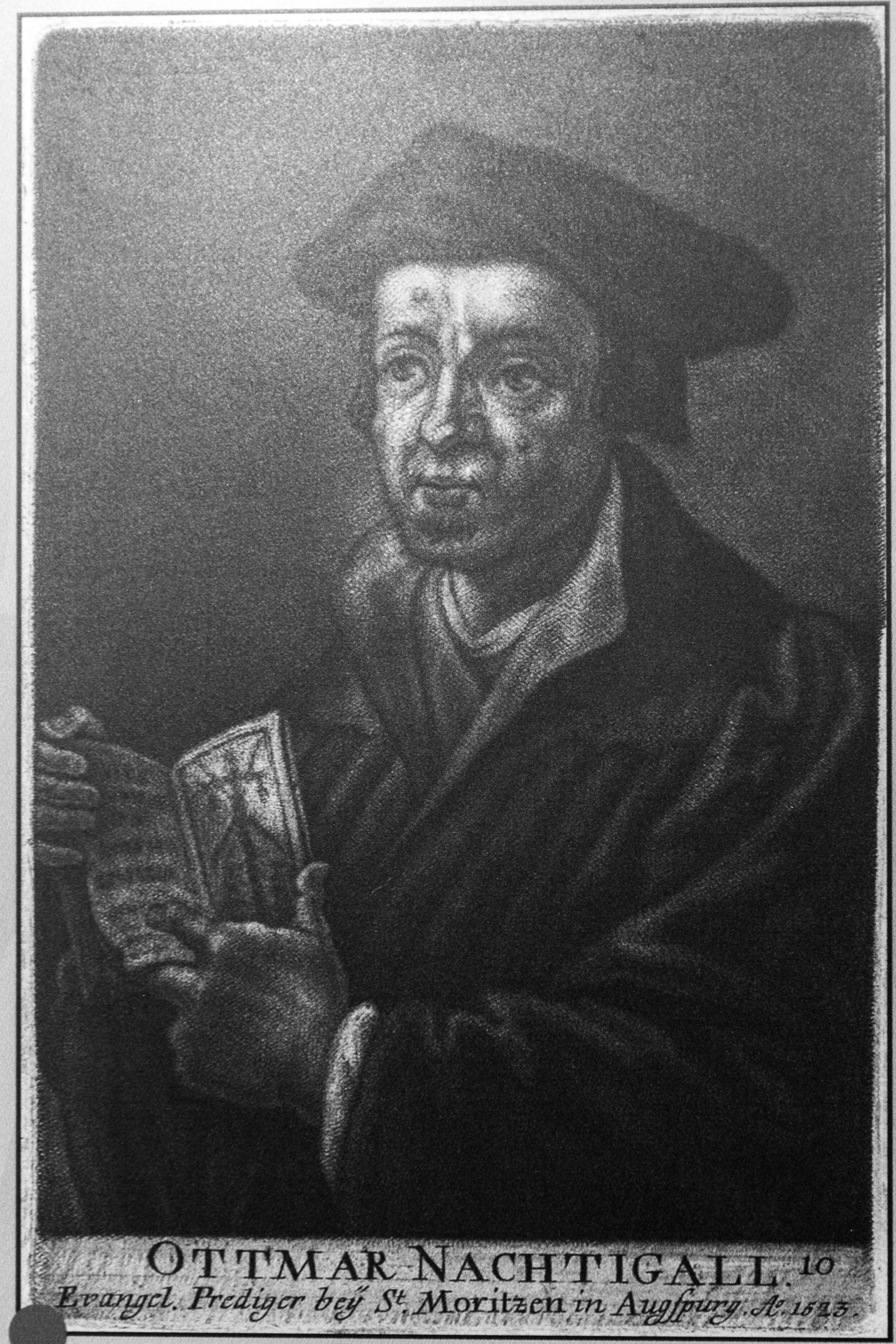 Ottmar Nachtgall (latinisé Ottomarus Luscinius, * 1480 à Strasbourg - † 1537 à Fribourg-en-Brisgau) fut un humaniste catholique alsacien, helléniste, connu pour ses nombreuses traductions grecques et latines. Après la Réforme protestante de Strasbourg il s'exila vers Augsbourg, puis à la chartreuse de Fribourg-en-Brisgau.